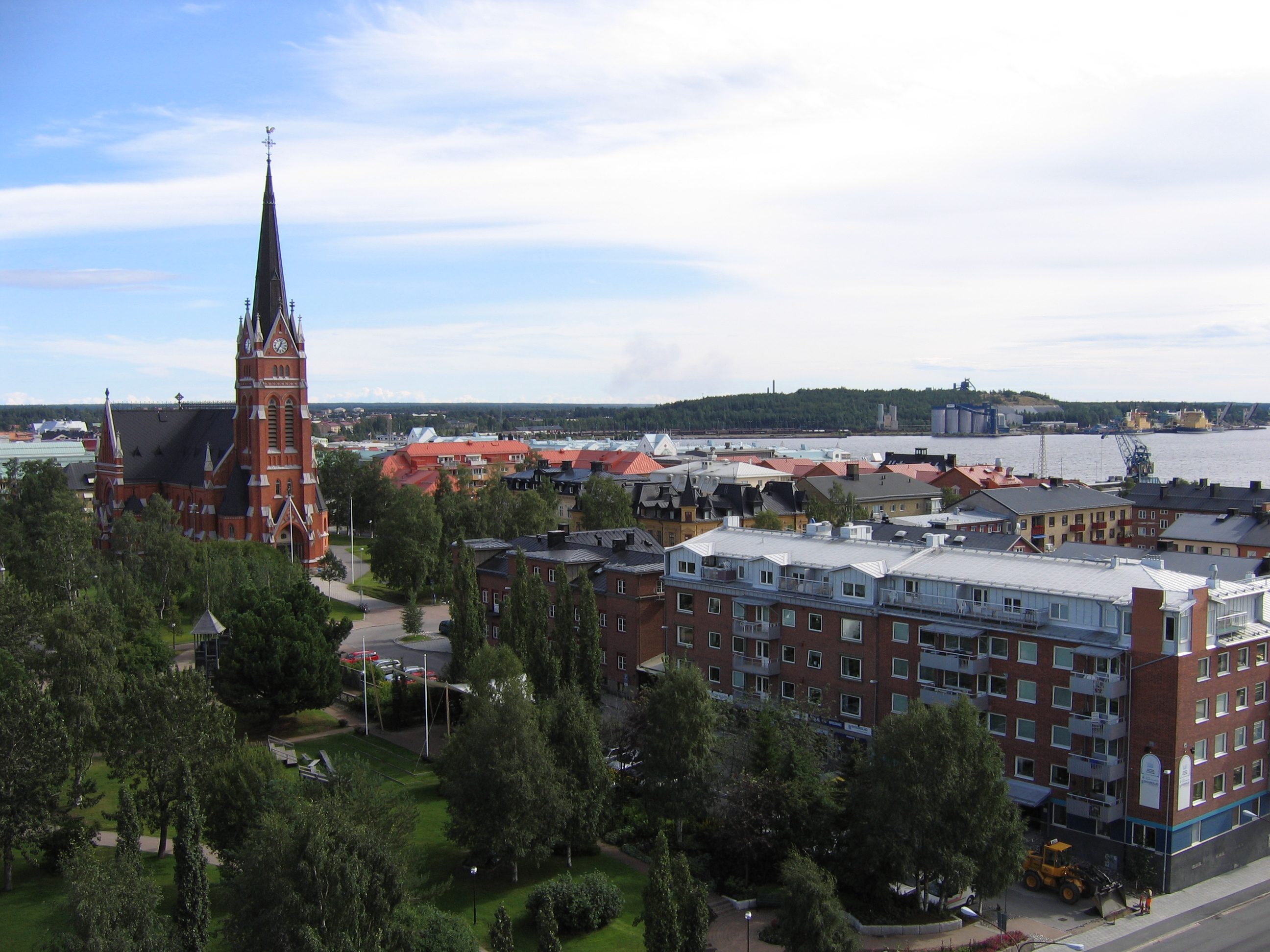 Luleå, taken 16/08/2005